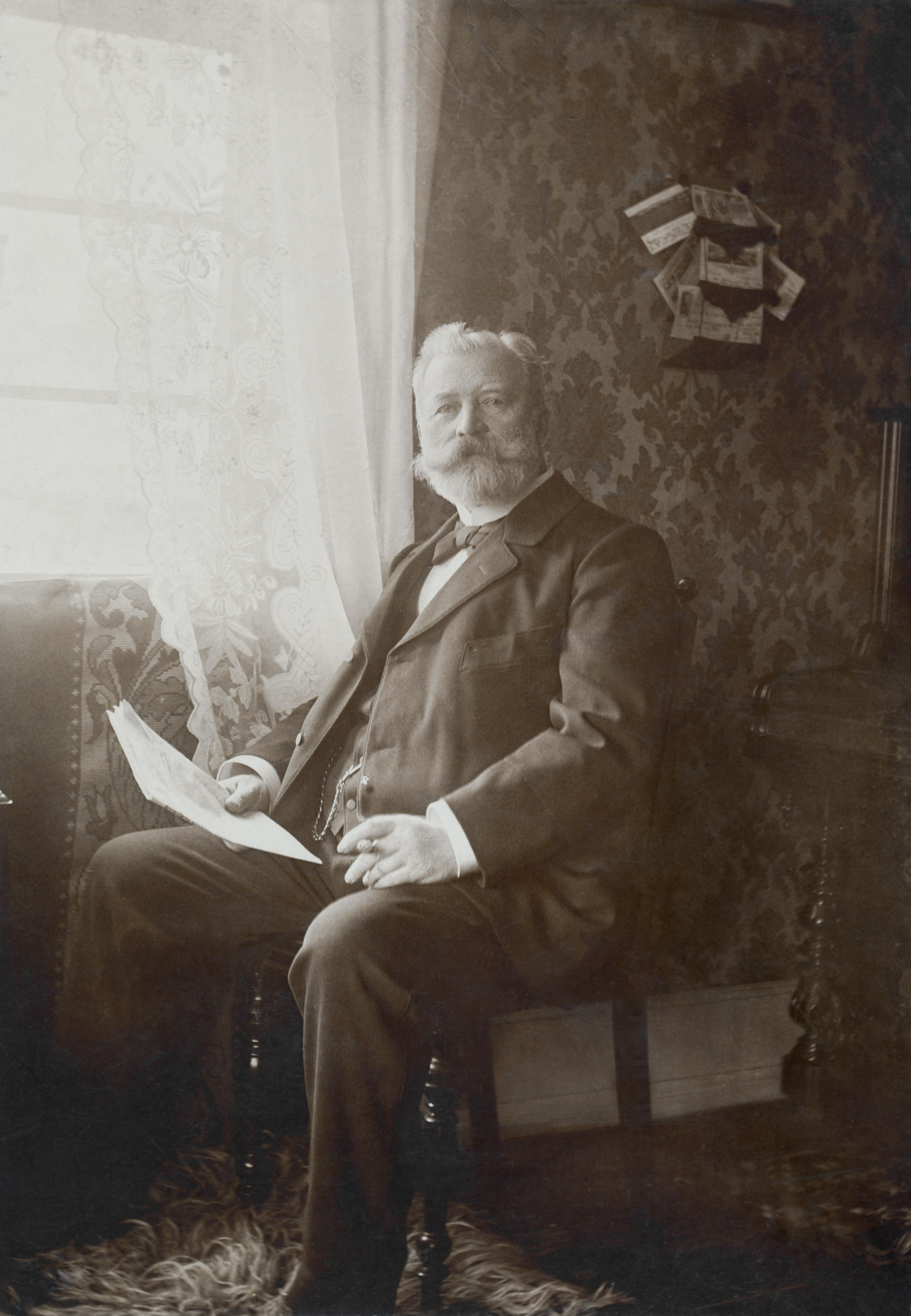 Heinrich Christoph Röpenack privat in Dresden